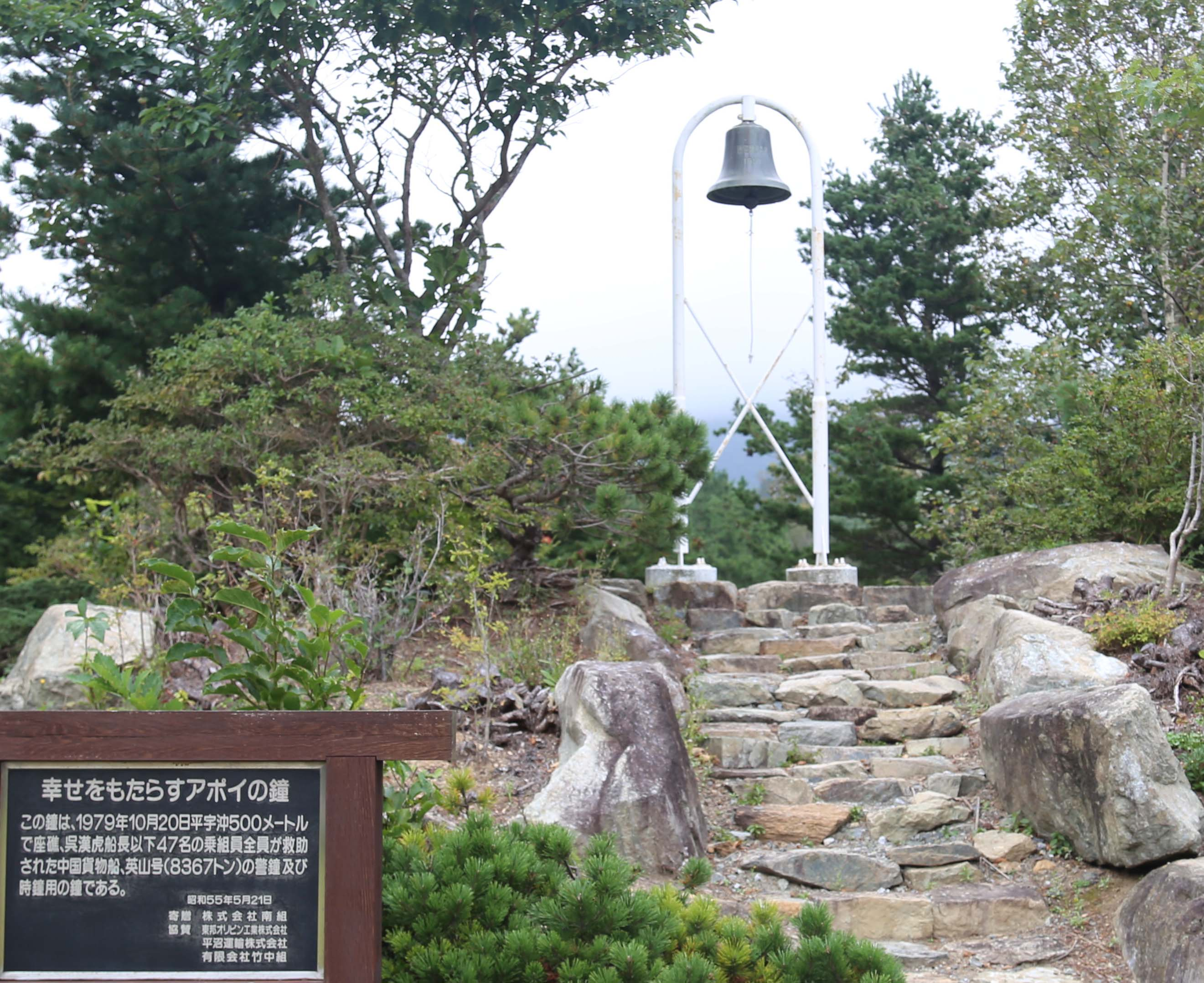 アポイの鐘は救助された英山号の鐘